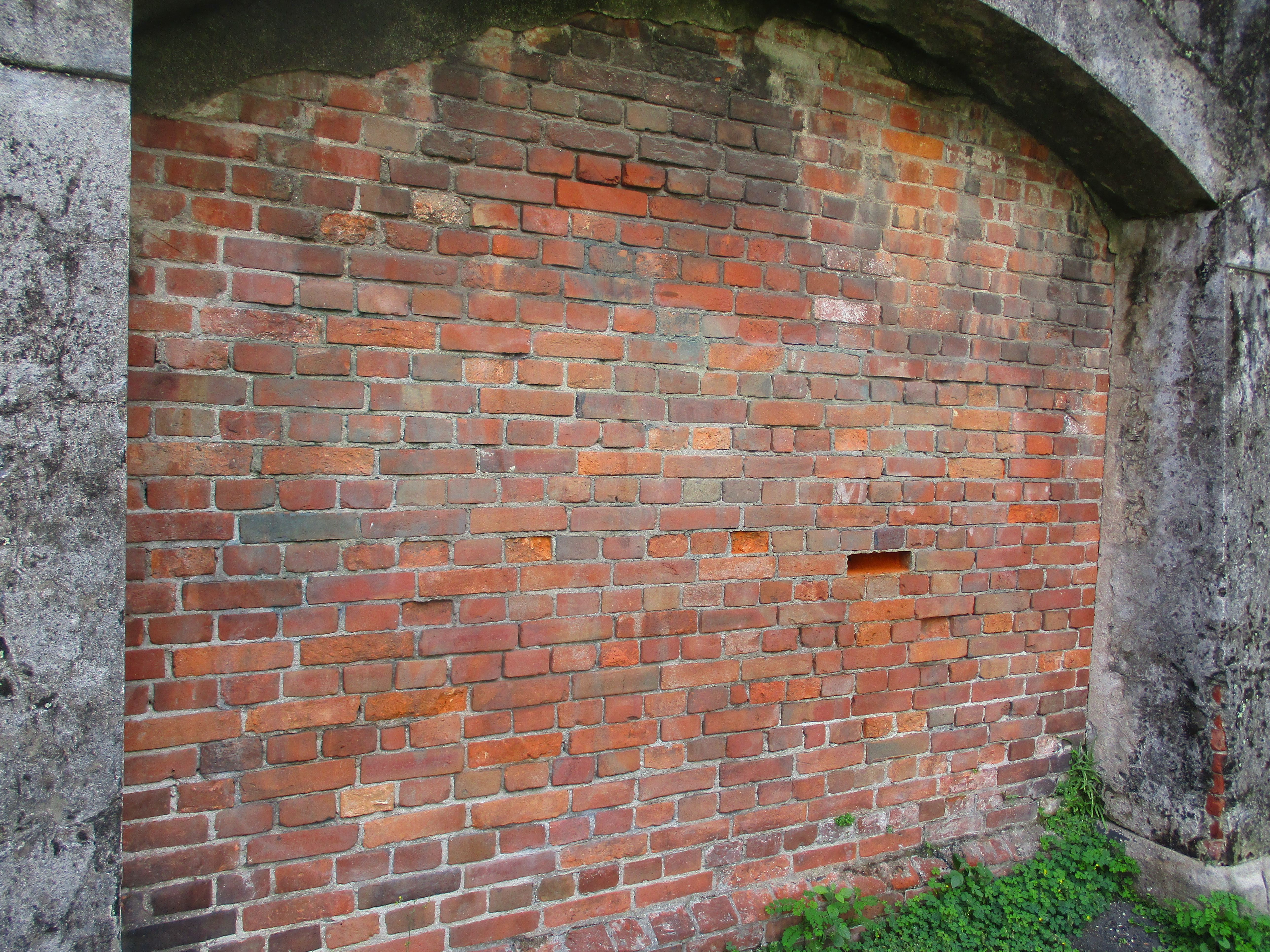 타이베이 형무소에서 과거 시신을 내보내던 문으로 현재는 벽돌로 막아놨다. 2016년 11월 5일 타이베이 형무소 유적에서 촬영.